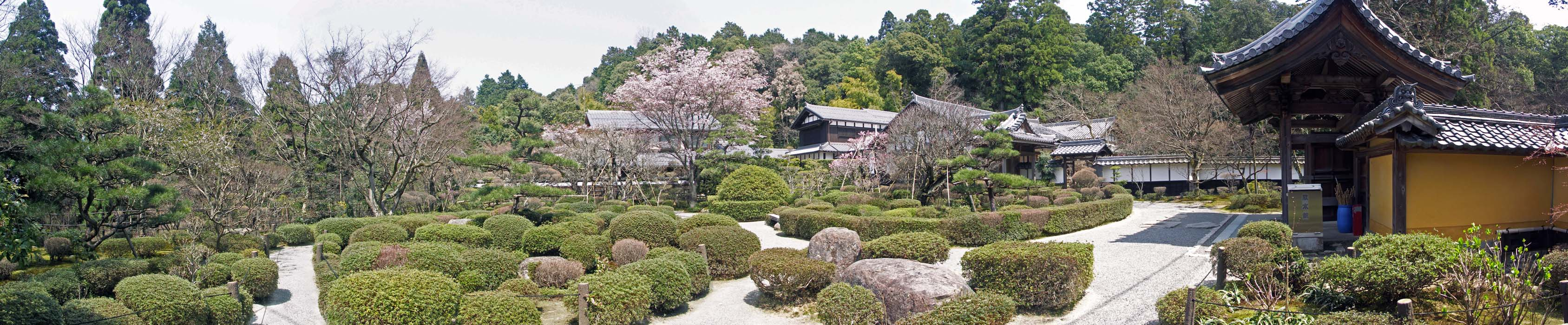 Saimyouji temple , 西明寺